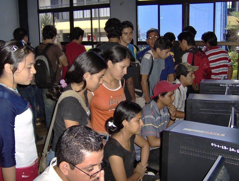 Linux Tour @ UNI (Managua, Nicaragua)